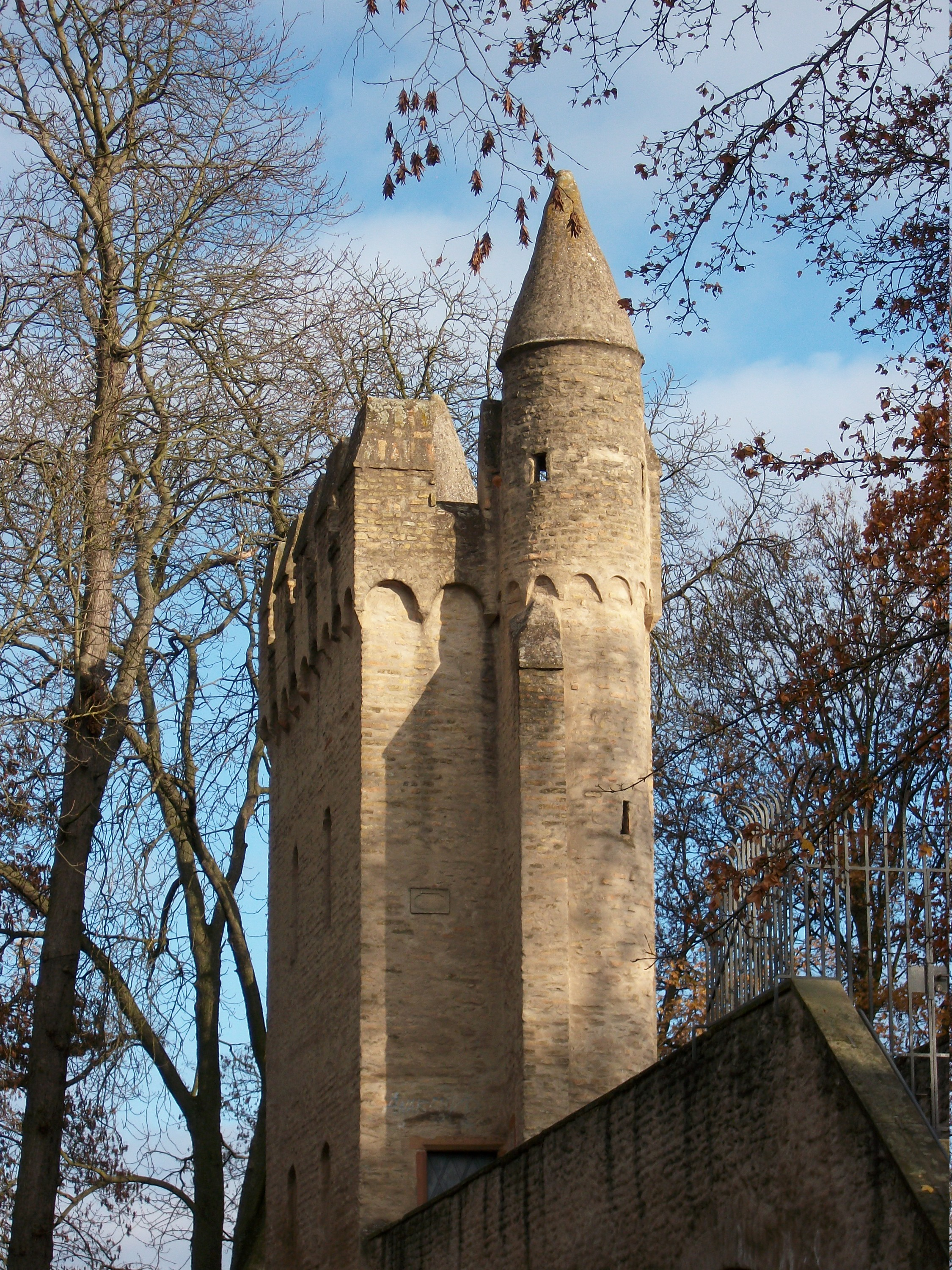 Heidentürmchen Speyer